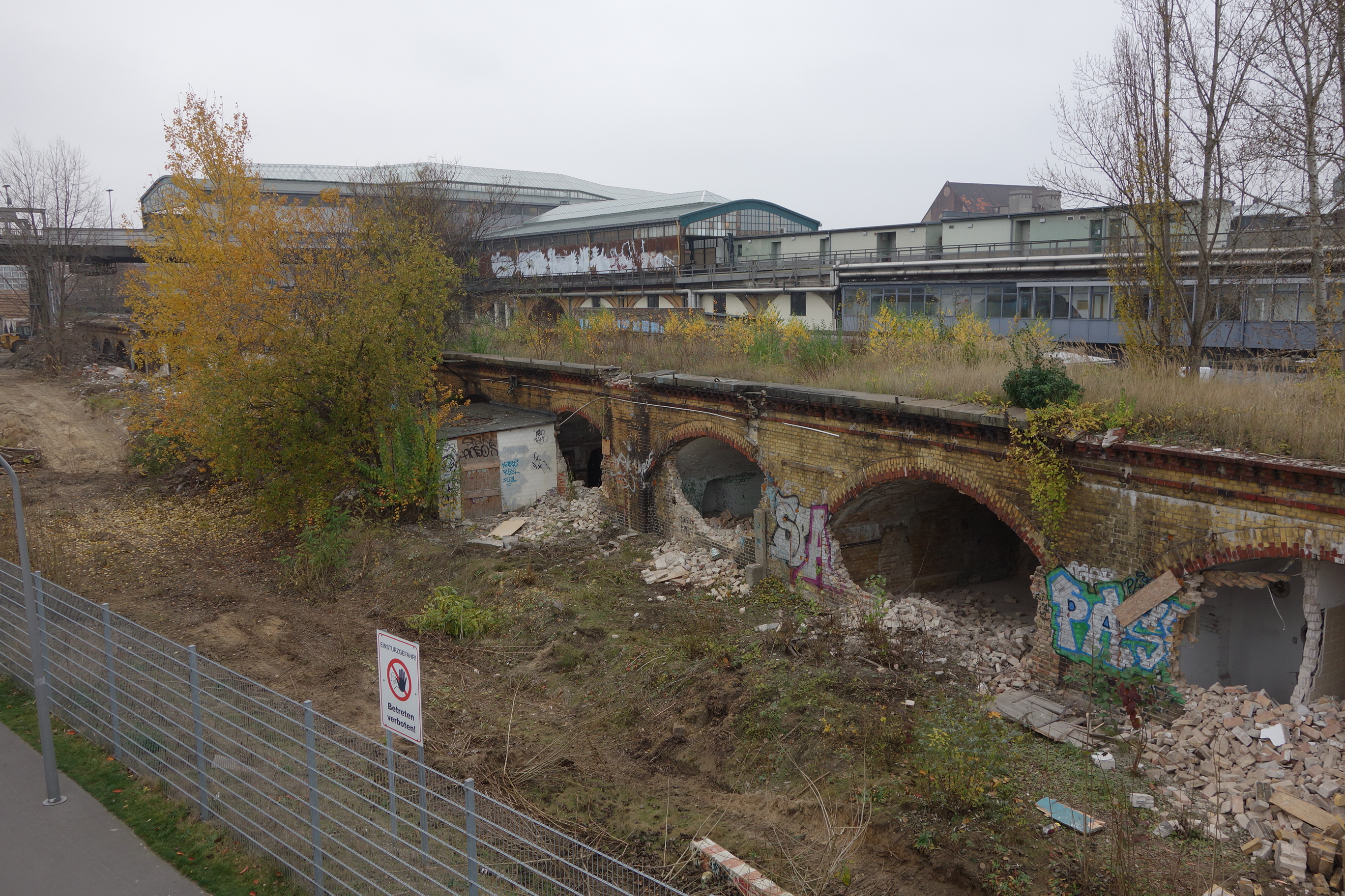 Viadukt der Südringspitzkehre neben dem U-Bahnhof Gleisdreieck, Berlin